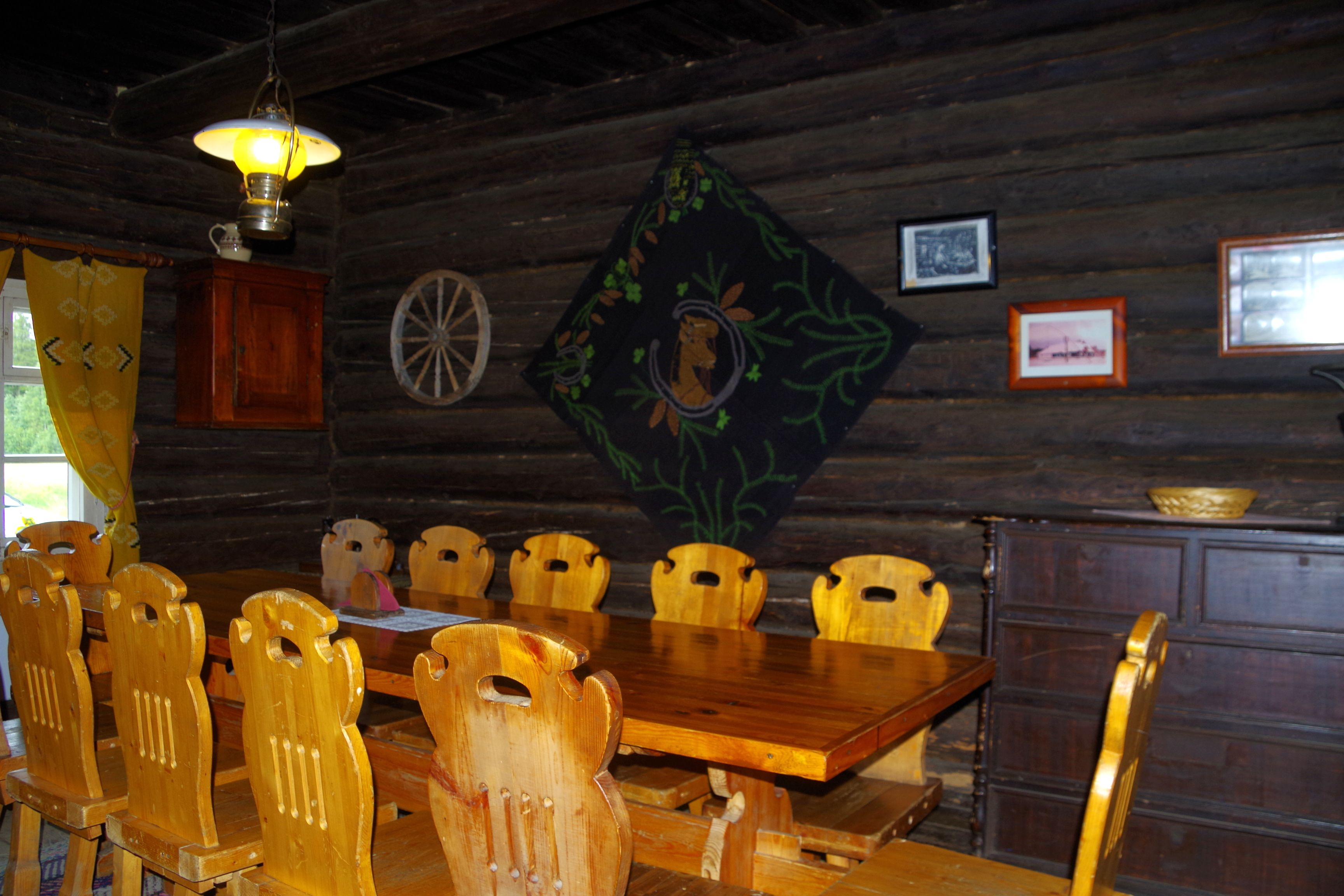 Nõmme kõrts